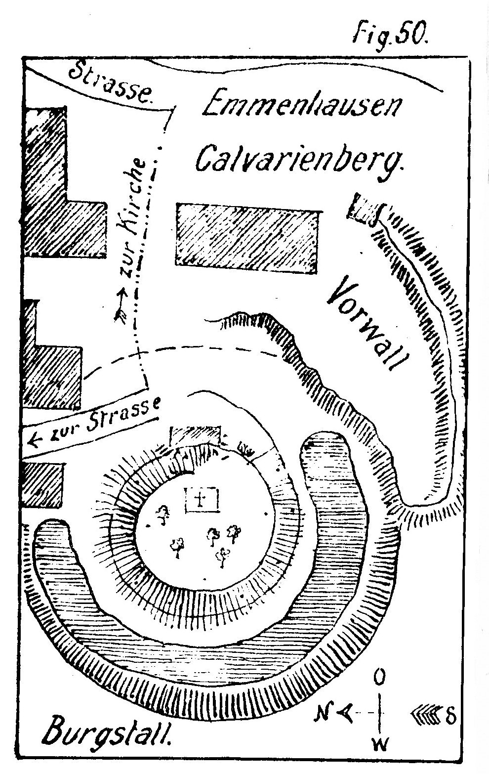 Plan des ehemaligen Burgstalles in Emmenhausen (Waal)von 1899